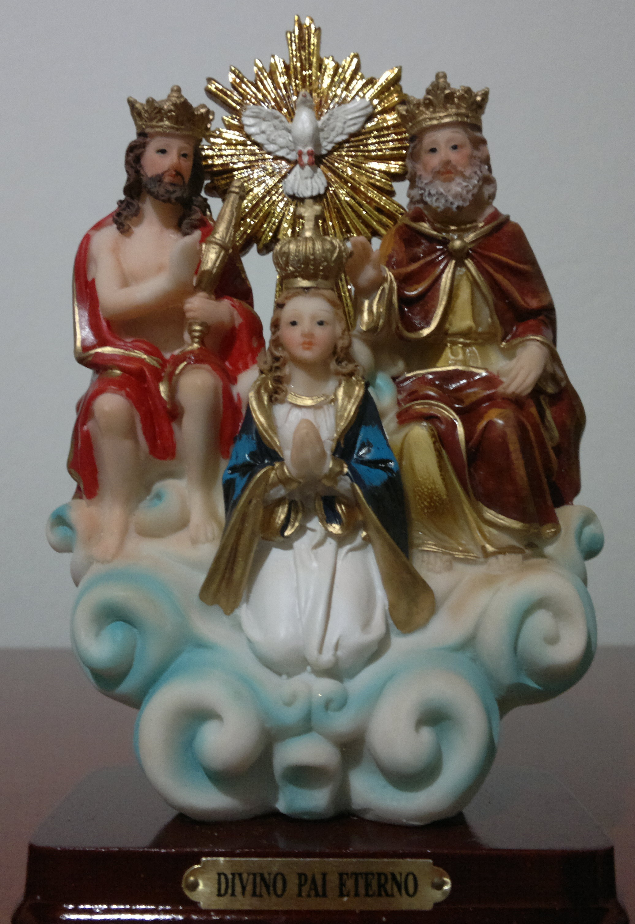 Imagem do Divino Pai Eterno. Pai, Filho, Espírito Santo e Maria Santíssima